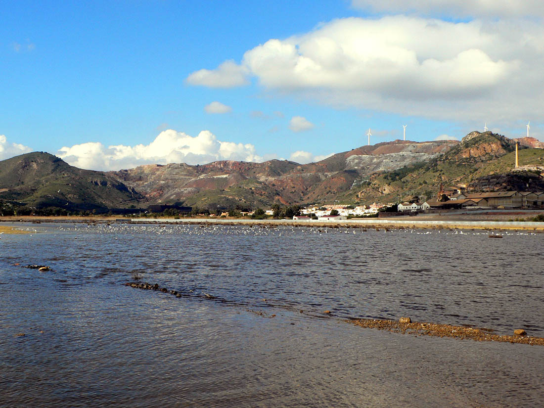 Cerro del Sancti Spiritus desde la playa de Portmán en La Unión, Región de Murcia (España).